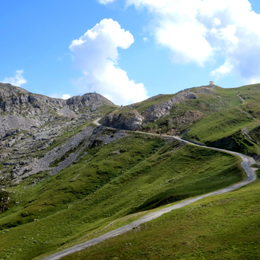 vista sul Colle Fauniera lato Castelmagno